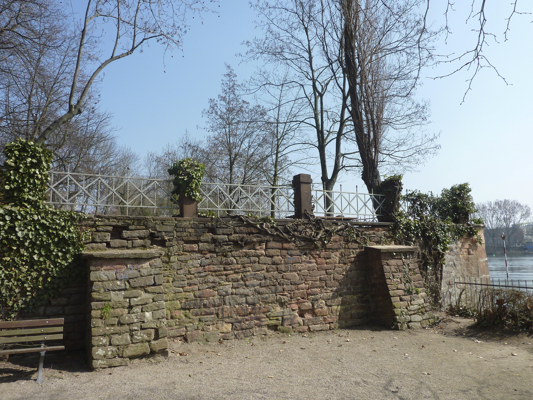 Frankfurt am Main, Bundesland Hessen, Deutschland: Der Sommerhoffpark im Stadtteil Frankfurt-Gutleut wurde im frühen 19. Jahrhundert als Englischer Landschaftsgarten eines privaten Herrensitzes des Frankfurter Bankiers und Weinhändlers Johann Noe Gogel angelegt. Architekt der Villa / Gut Gogel war Nicolas Alexandre Salins de Montfort (* 1753 Versailles; † 1838 Nantes). Im Jahr 1883 wechselte das Anwesen den Besitzer; dessen Nachname Sommerhoff blieb als Bezeichnung für den Park erhalten. Seit 1928 ist das Gelände im Besitz der Stadt Frankfurt; von den Bauten des Gogelschen Herrensitzes sind durch Fliegerbomben des Zweiten Weltkriegs lediglich größere Teile der Umrandungsmauern des Grundstücks aus rotem Buntsandstein sowie Teile von deren schmiedeeisernen Zäunen erhalten geblieben. Das Foto zeigt die westliche Stützmauer der östlichen Terrasse mit Wurzelbewuchs.